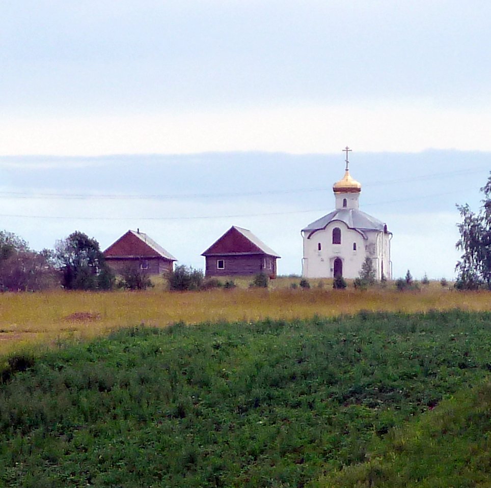 Permskiy Kray, Russia. Печмень, часовня